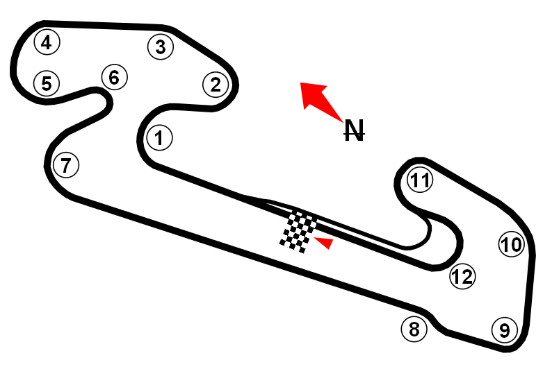 alles gelogen